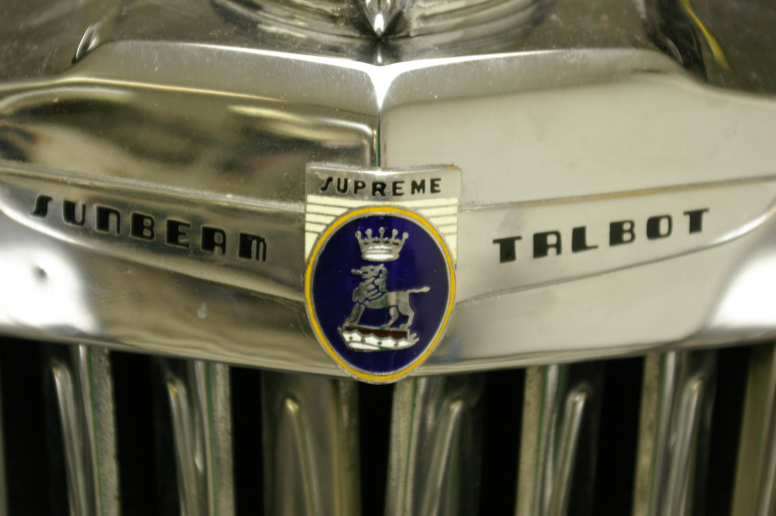 Sunbeam-Talbot badge